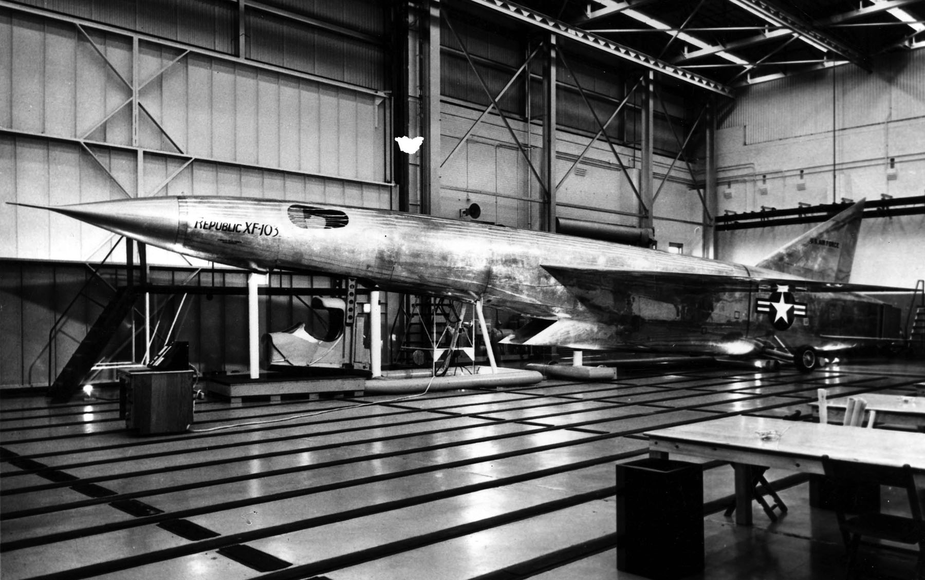 Republic XF-103 mock-up